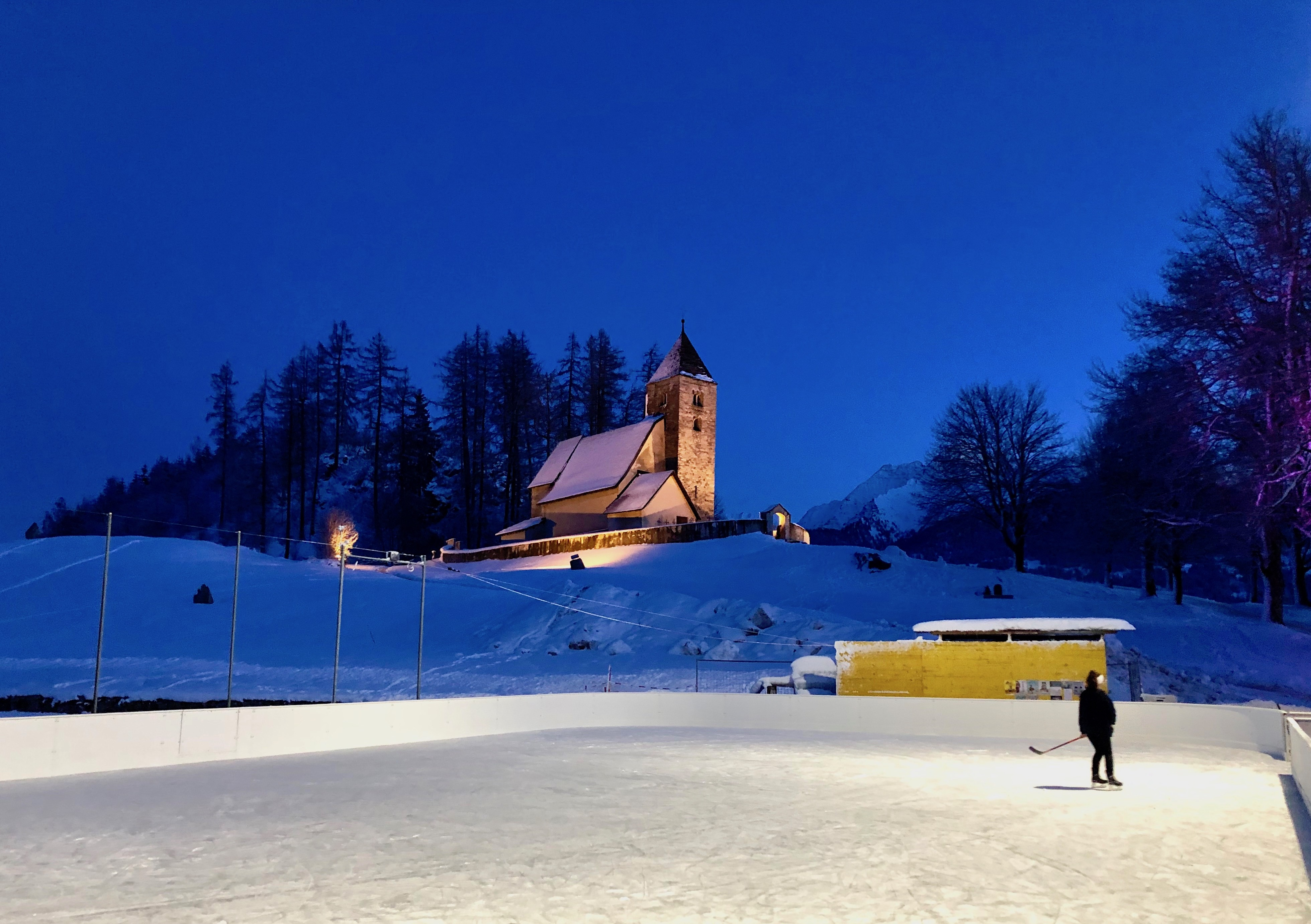 Kunsteisfeld in Falera